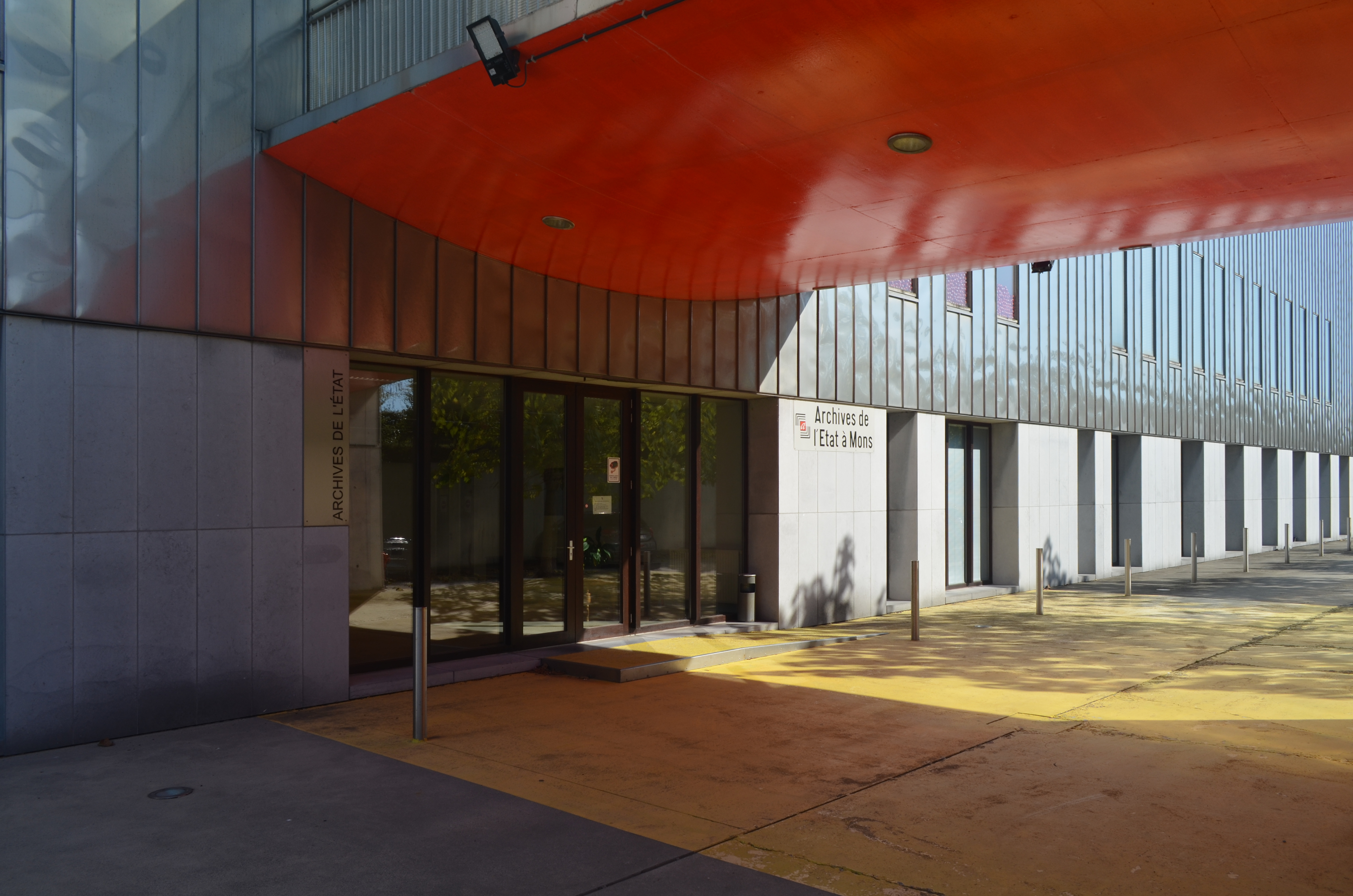 Mons (Belgique) - Mons Expo, hall multifonctionnel avec au sous-sol les Archives de l'État à Mons. Accès aux archives de l'État sous la passerelle d'accès au hall d'exposition.